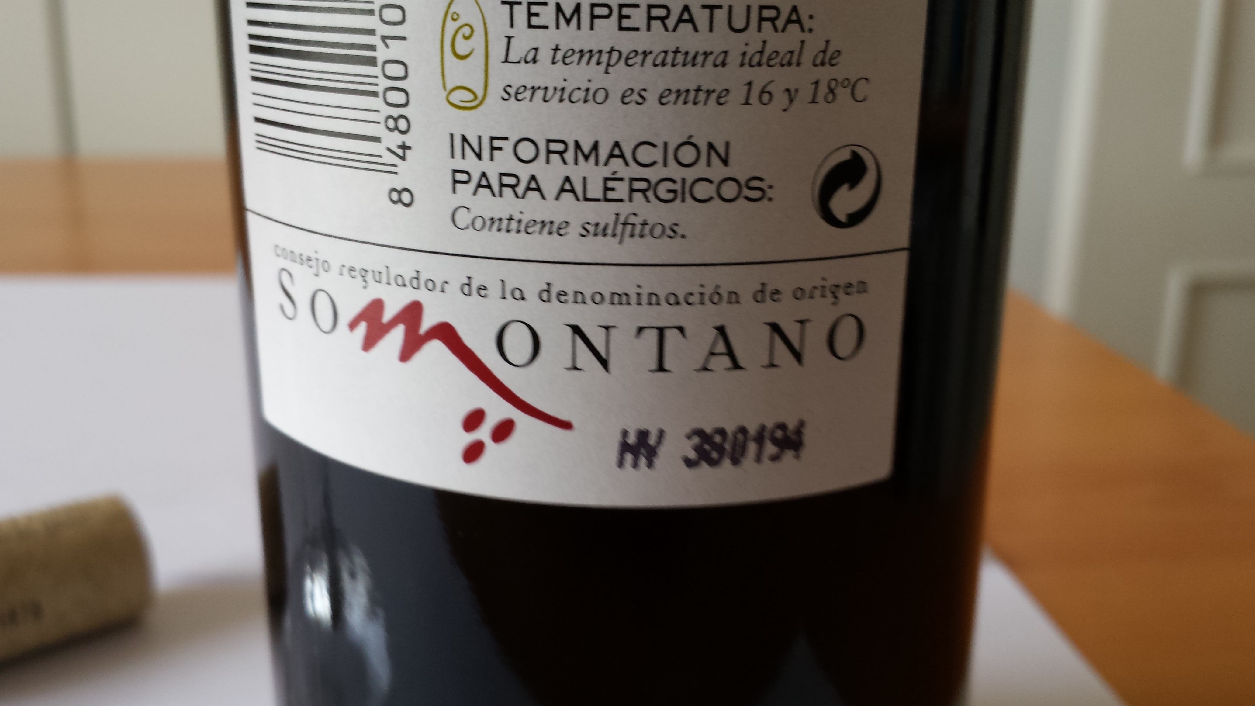 Etiqueta de la DO Somontano. Aragon, España